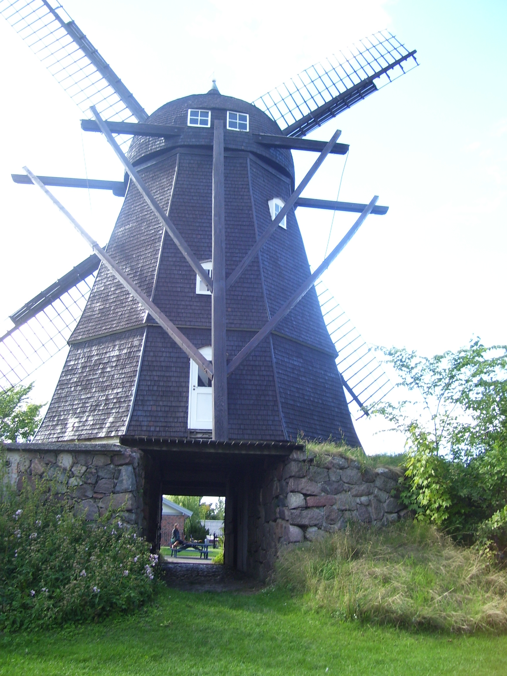 Melby Mølle med gennemkørsel